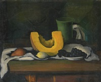 Johann Wilhelm von Tscharner Stillleben mit Kürbis